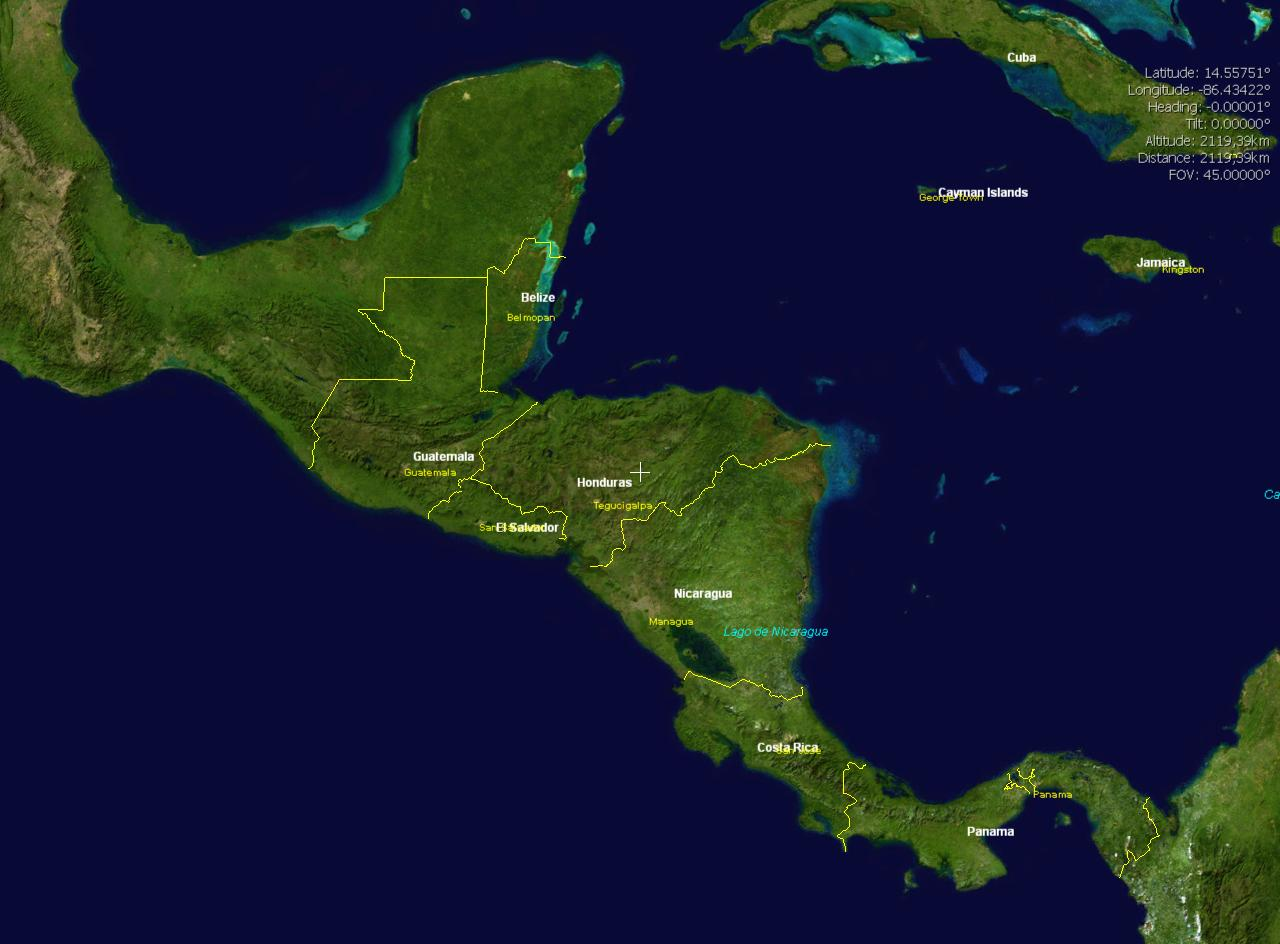 Satellittfoto over Mellom-Amerika